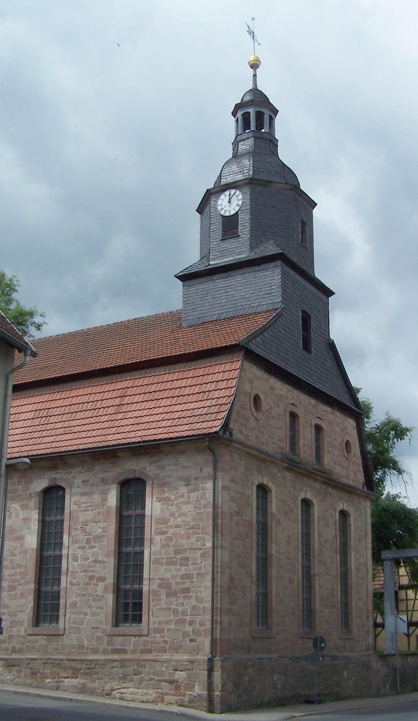 Die 1760 geweihte Totenhofskirche in Schmalkalden, Bahnhofstraße, Ecke Sandgasse.